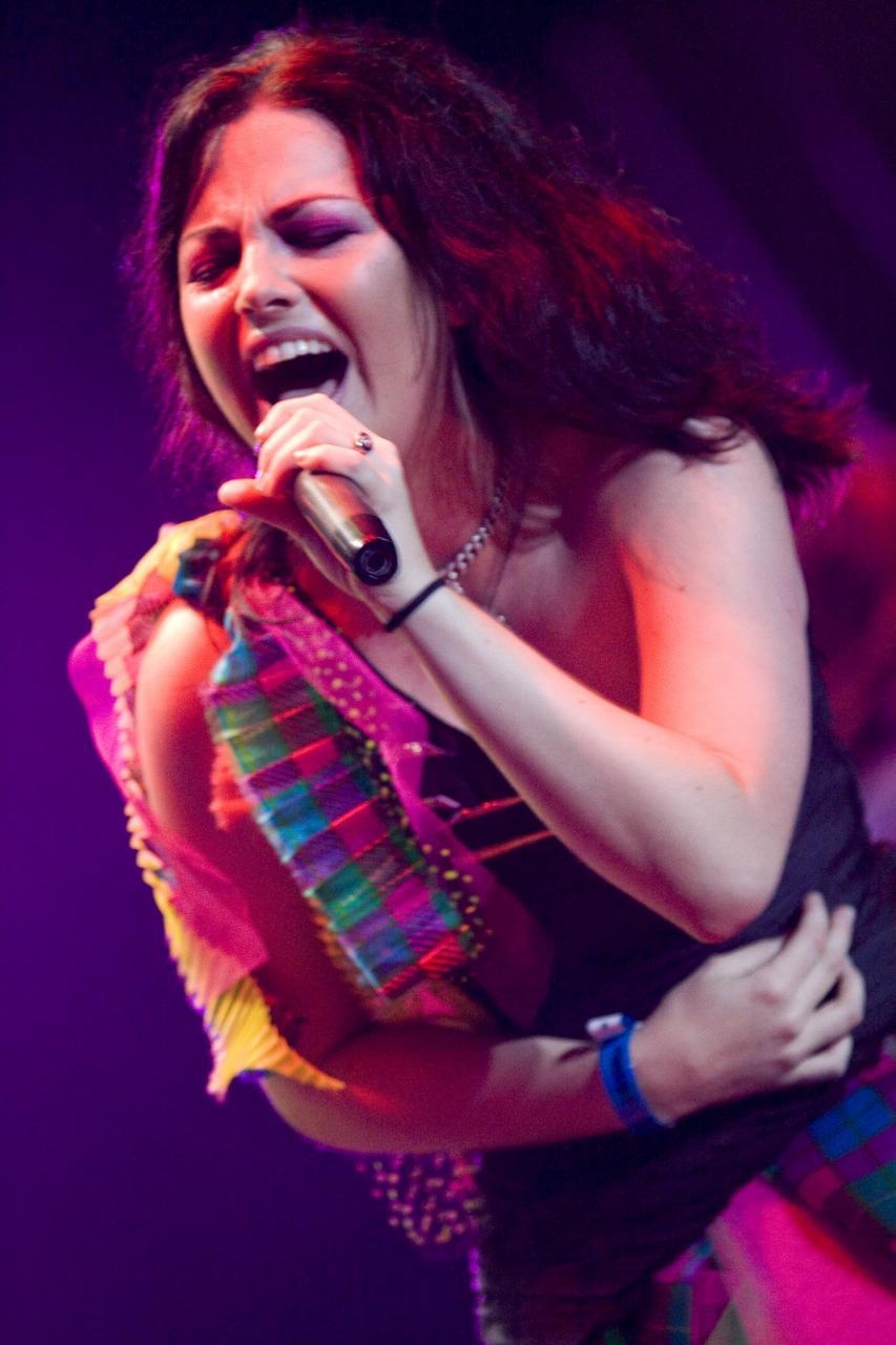 Evanescence @ Maquinaria Festival - 08/11/2009 - São Paulo, Brasil É proibida a cópia ou reprodução deste material sem a autorização do autor. Por favor, não publique nada daqui sem o devido crédito. Fotógrafo: Alexandre Cardoso